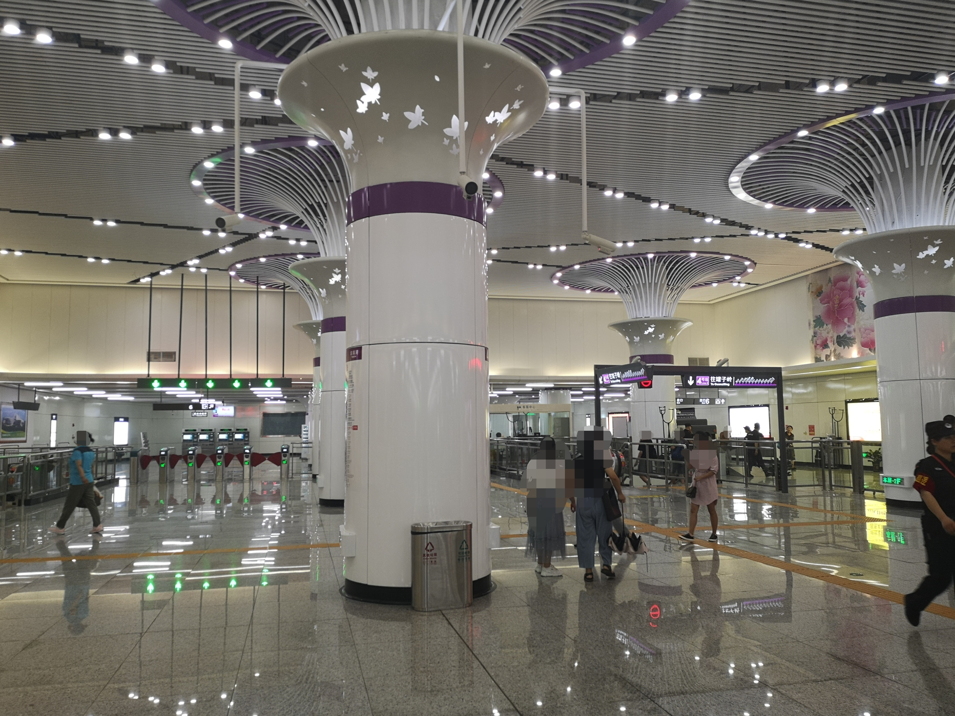 中文（中国大陆）: 阜埠河站内部实景图，为保护隐私，部分人已做马赛克处理。